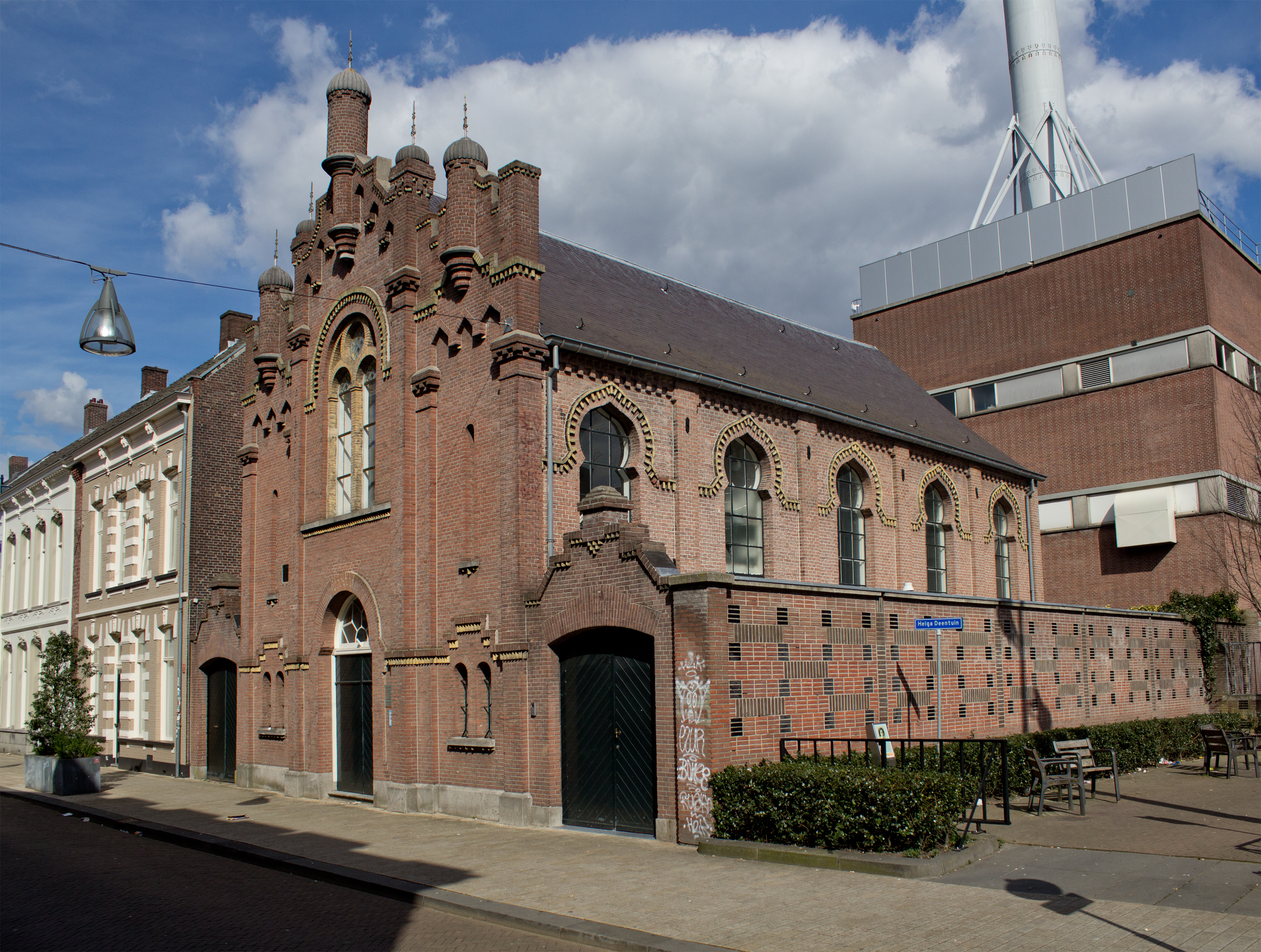 Tilburg, Synagoge, Willem II straat 20